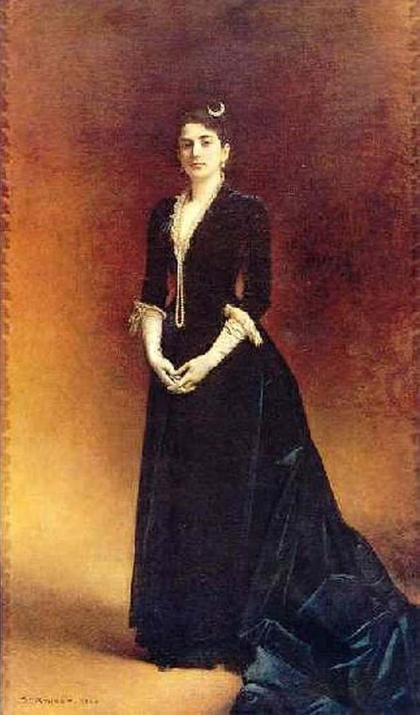 Marie Kann peinte par Léon Bonnat en 1881.